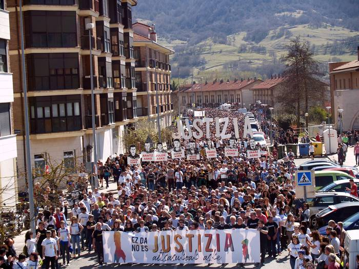 Altsasun 2019ko martxoaren 24an egindako "Ez da justizia" manifestazioaren argazkiak. Guaixeren argazkiak. Q12258760 Authority control : Q12258760 creator QS:P170,Q12258760